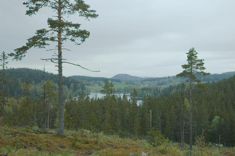 Bysjön. Motiv: Ulvön Nyckelord: Riksintressen, Världsarv Kategori: Kust- och skärgårdsmiljö Bysjön.